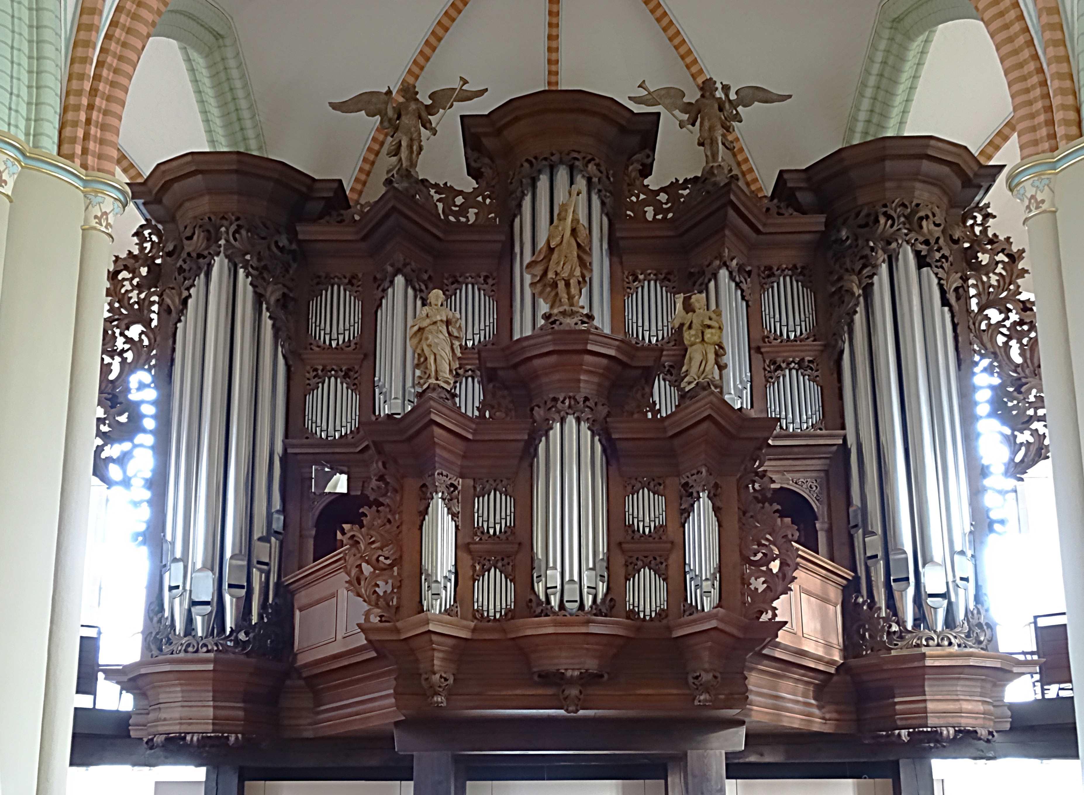 Orgel von Karl Schuke (1970) nach einem Entwurf von Arp Schnitger (1701) in der St. Salvatoris Kirche in Zellerfeld; auf dem Rückpositiv König David mit der Harfe, Mirjam mit Pauken und Asaf mit Triangel.